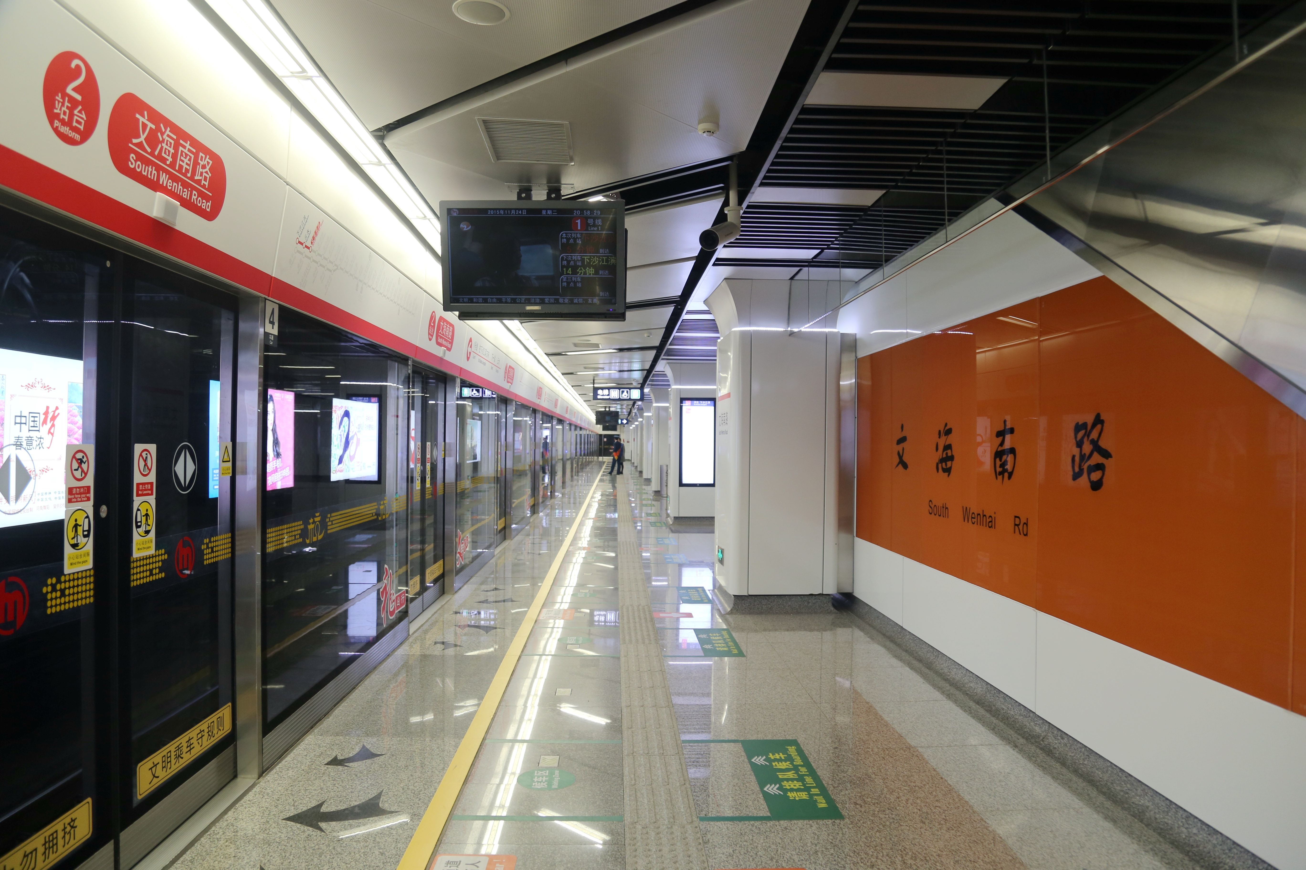 文海南路站站台标准角度